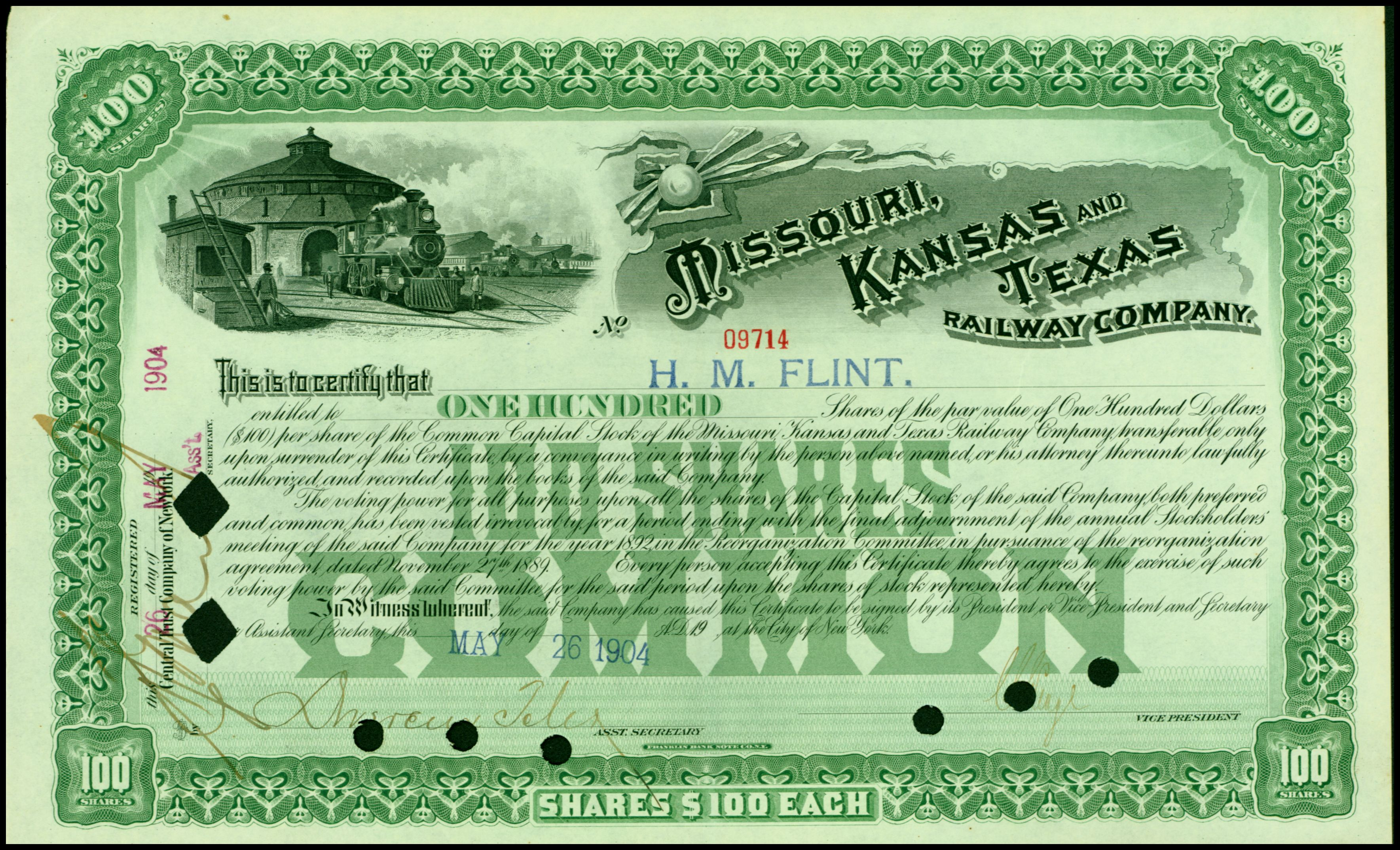 Aktie der Missouri, Kansas and Texas Railway Company von 1904; aus dem Fundus des Ersten Deutschen Historic-Actien-Museum e.V. (EDHAM), Kürnbach